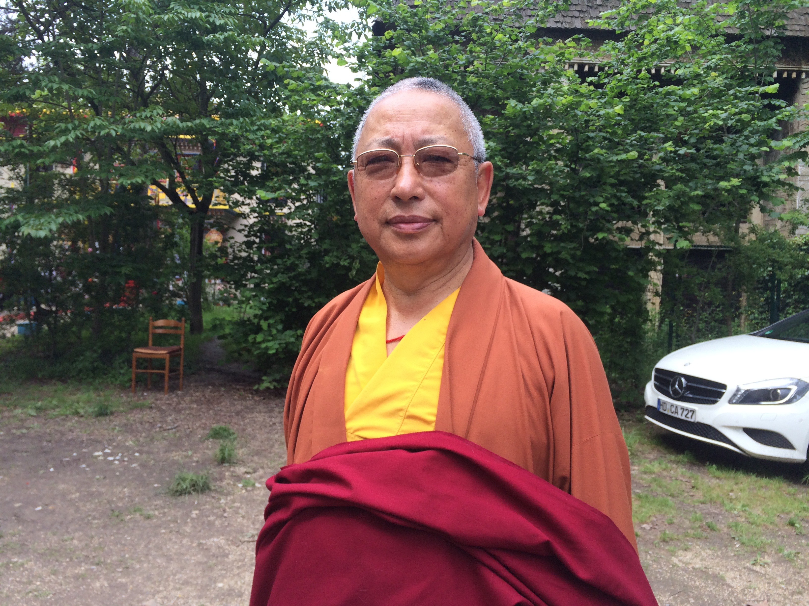 Lama Gyurmé